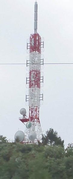 FM岩手アンテナ